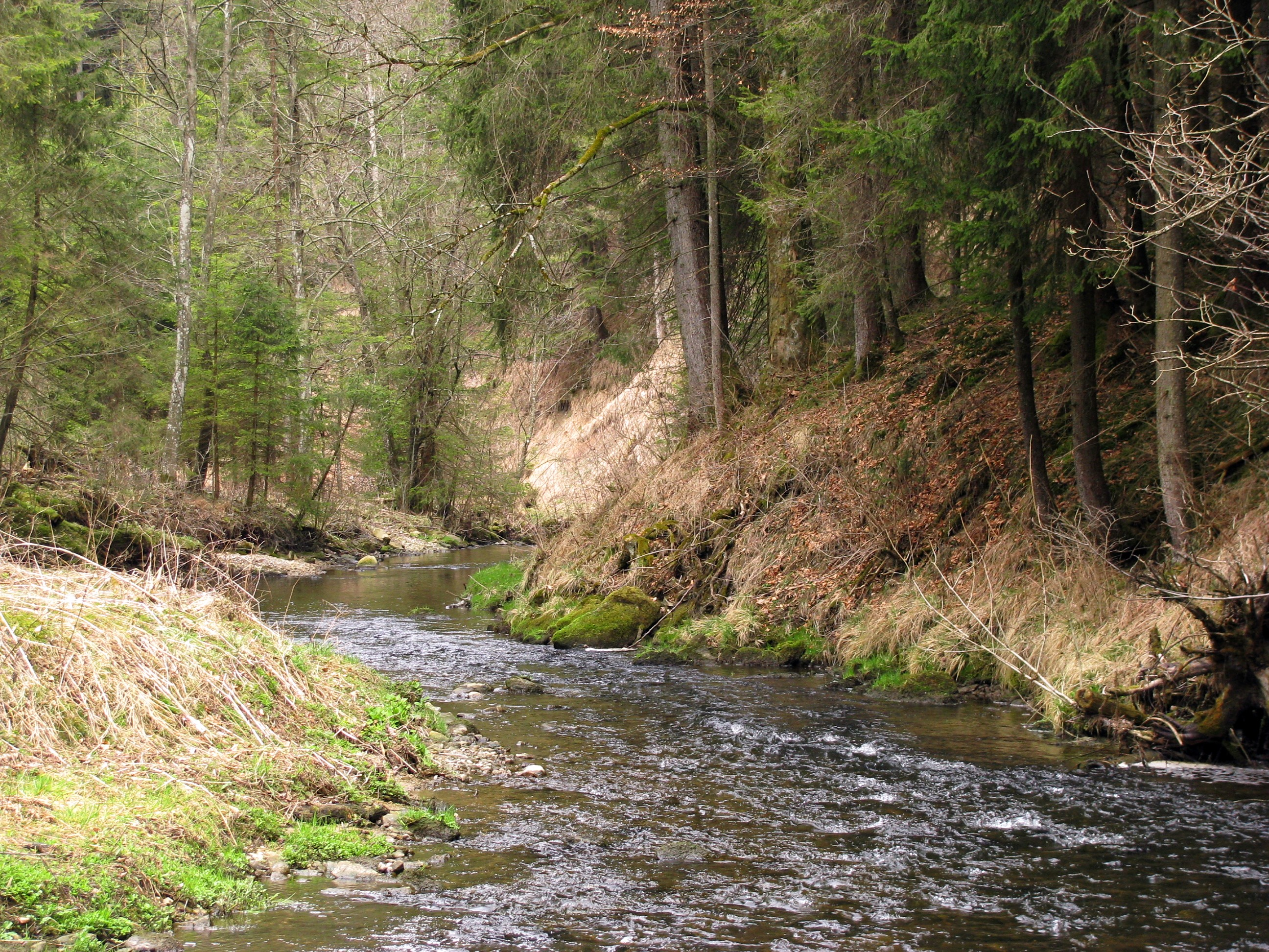 Illach in der Illachschlucht zwischen Wildsteig und Rudersau